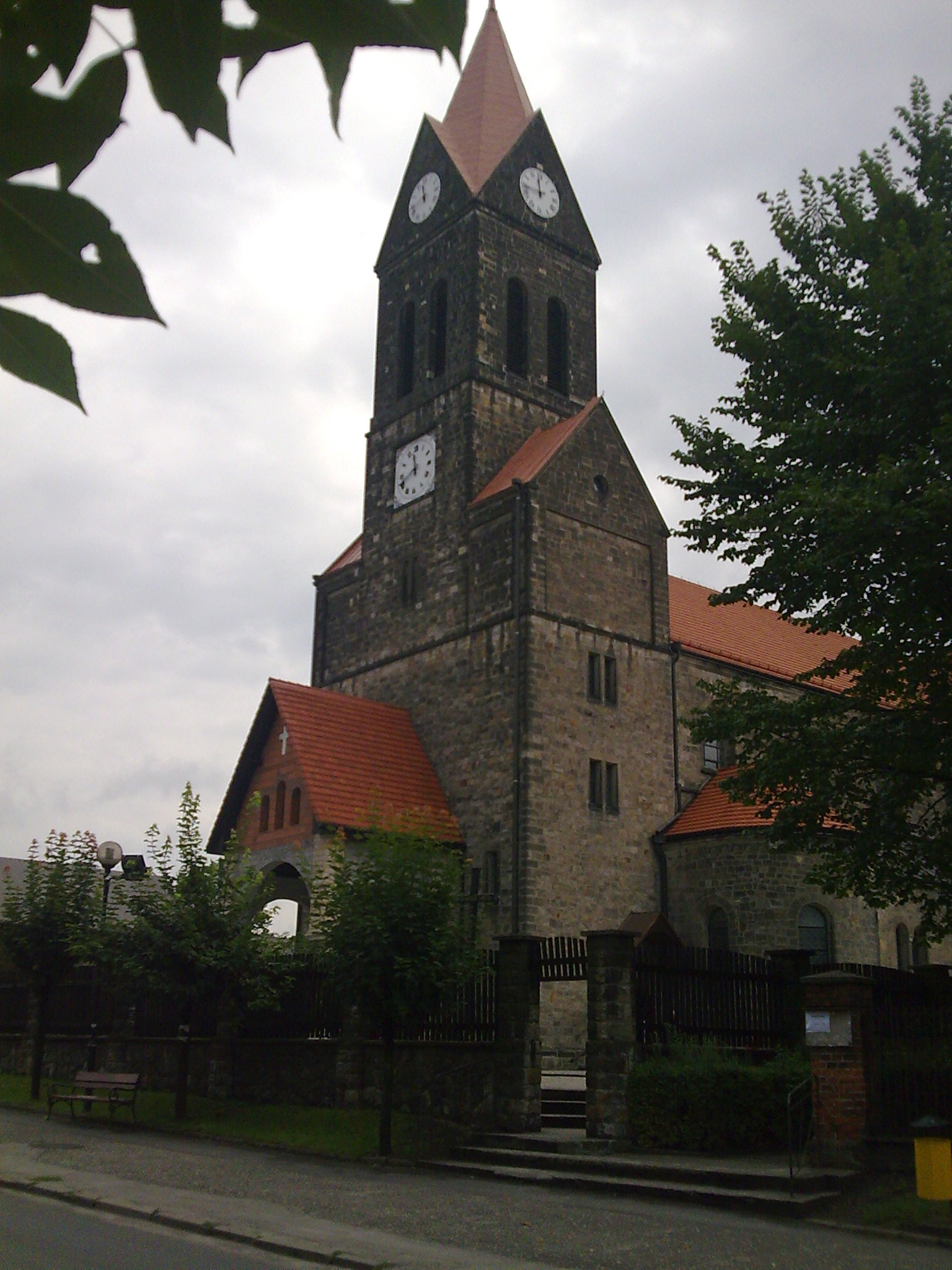 Orzesze, kosciół Nawiedzenia NMP